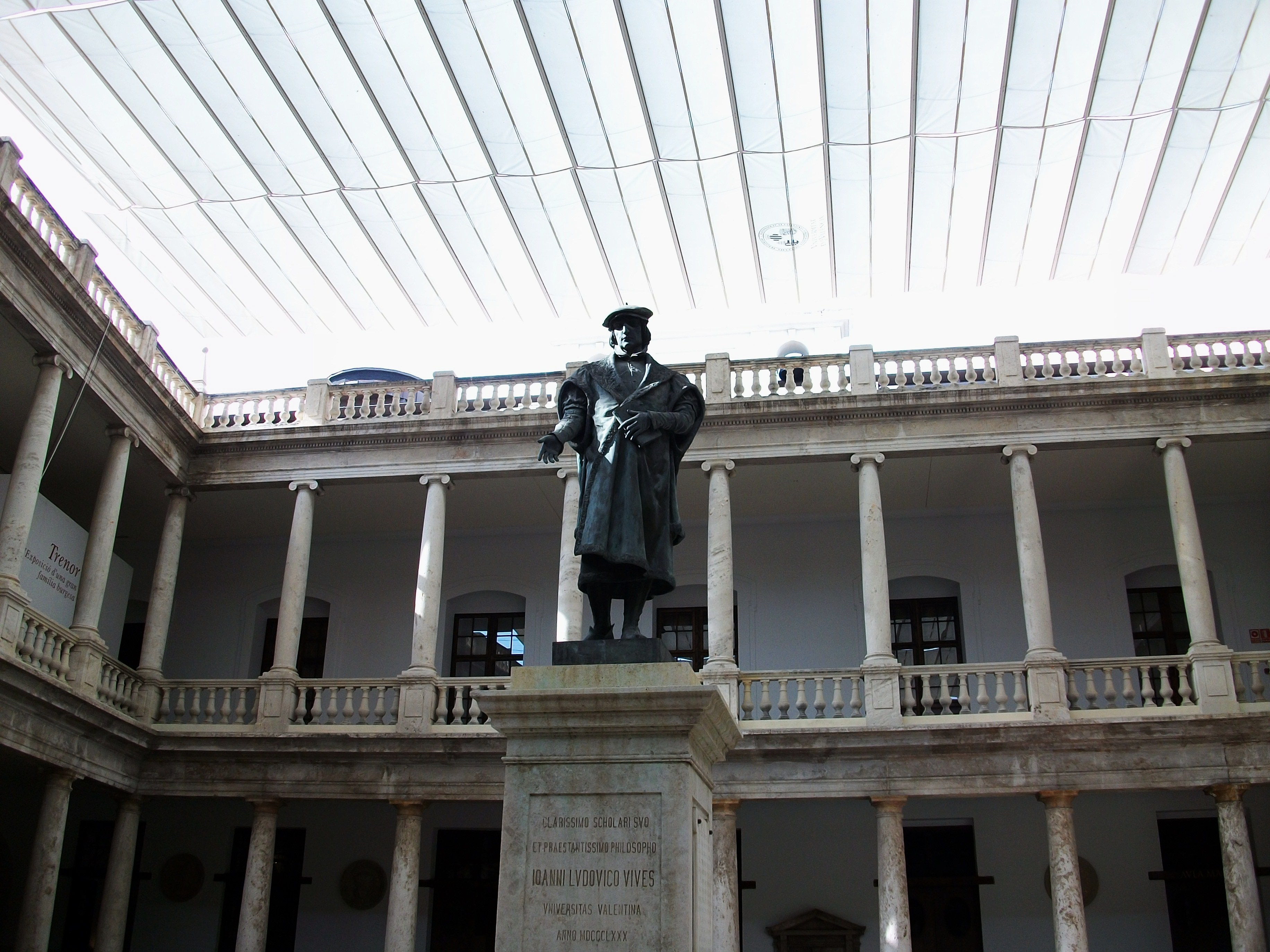 Claustre de la Nau i estàtua de Joan Lluís Vives.